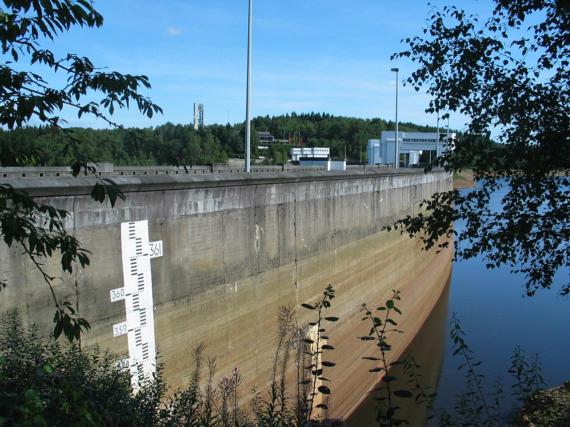 Staudamm der Wesertalsperre bei Eupen